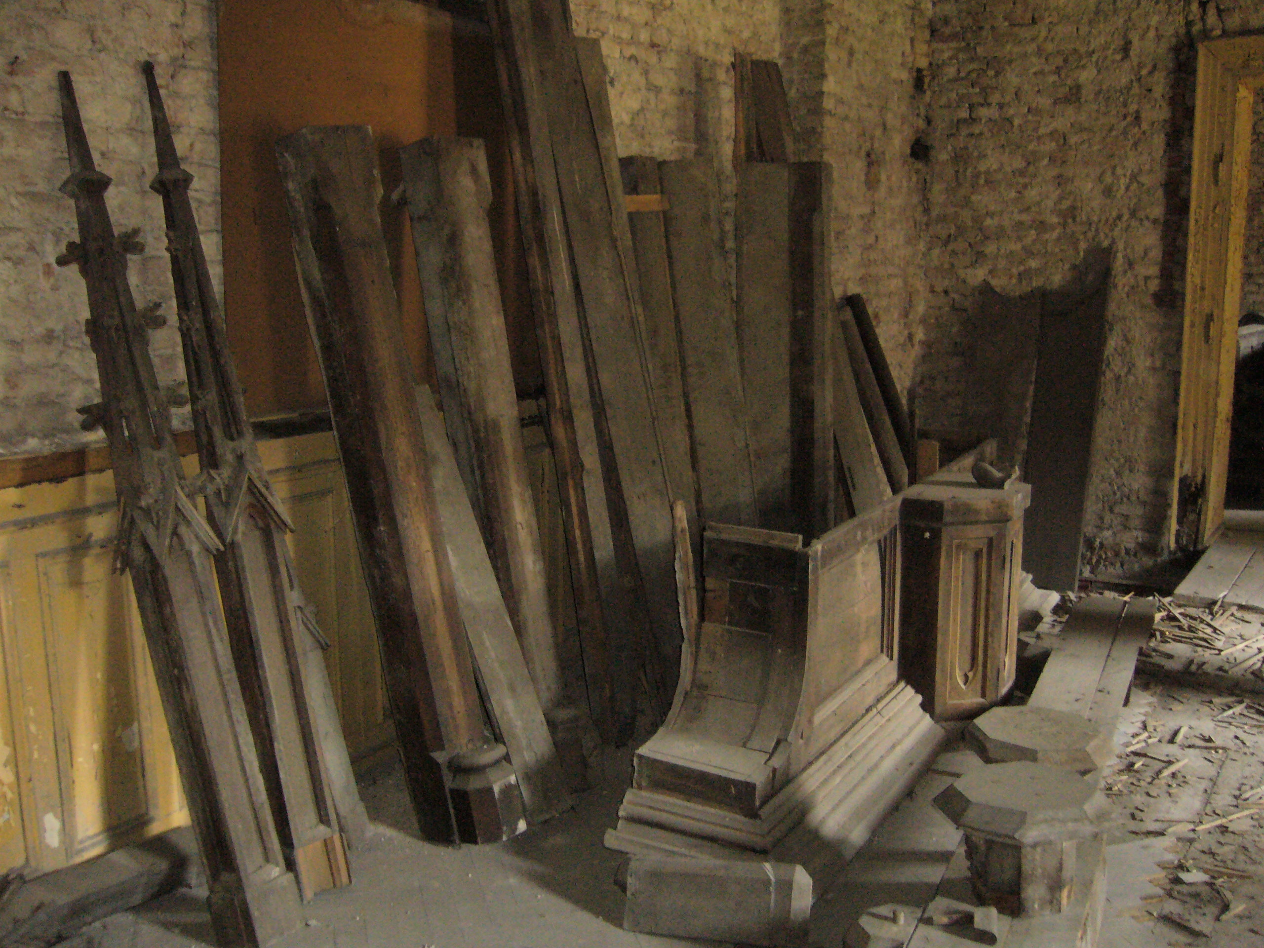 Kaplica zamkowa w Raciborzu. Nastawa ołtarzowa z kaplicy zamkowej w oczekiwaniu na renowację w pomieszczeniach zamkowych